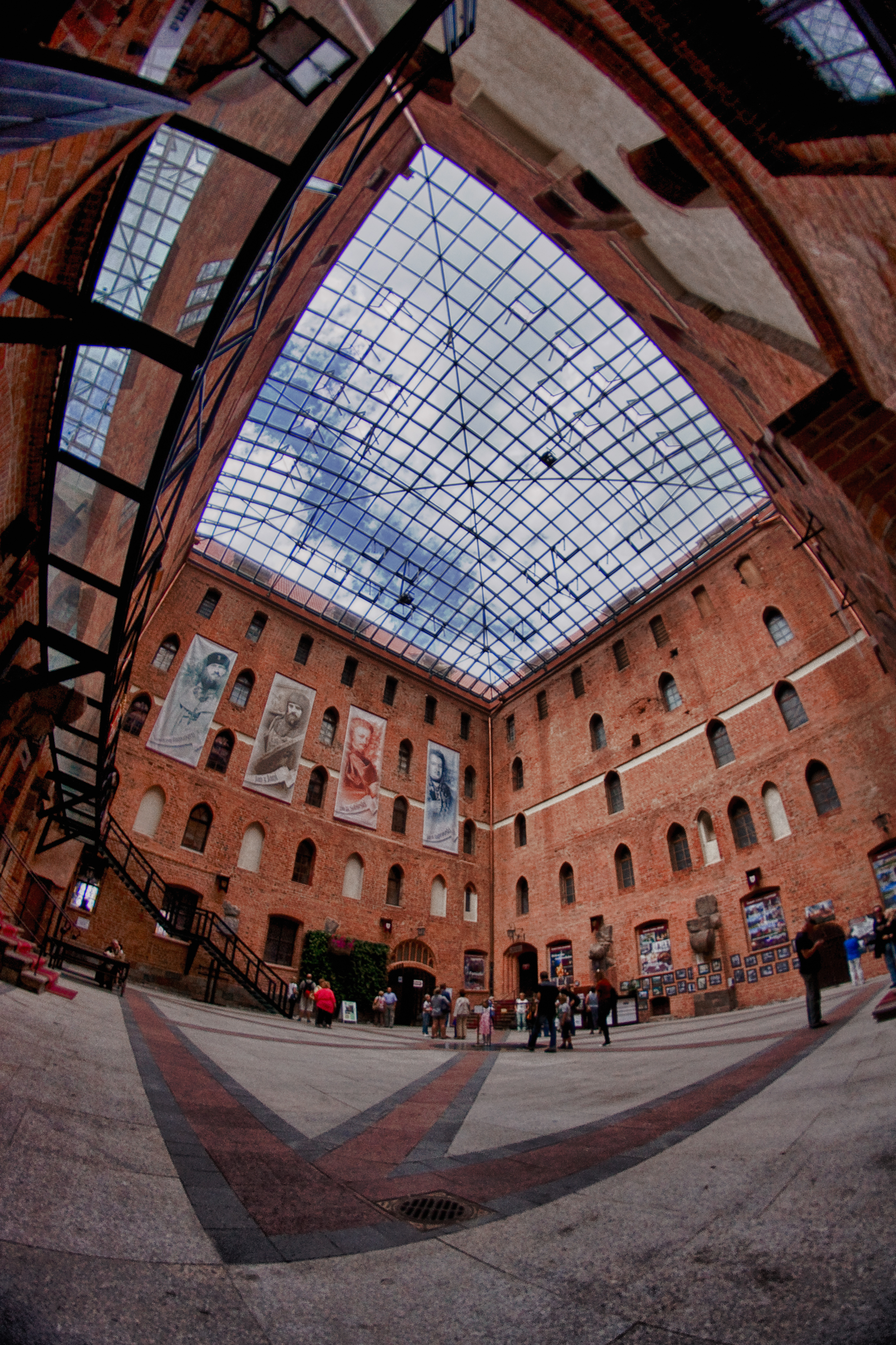 Gniew, zamek krzyżacki, XIII-XIV, XIX